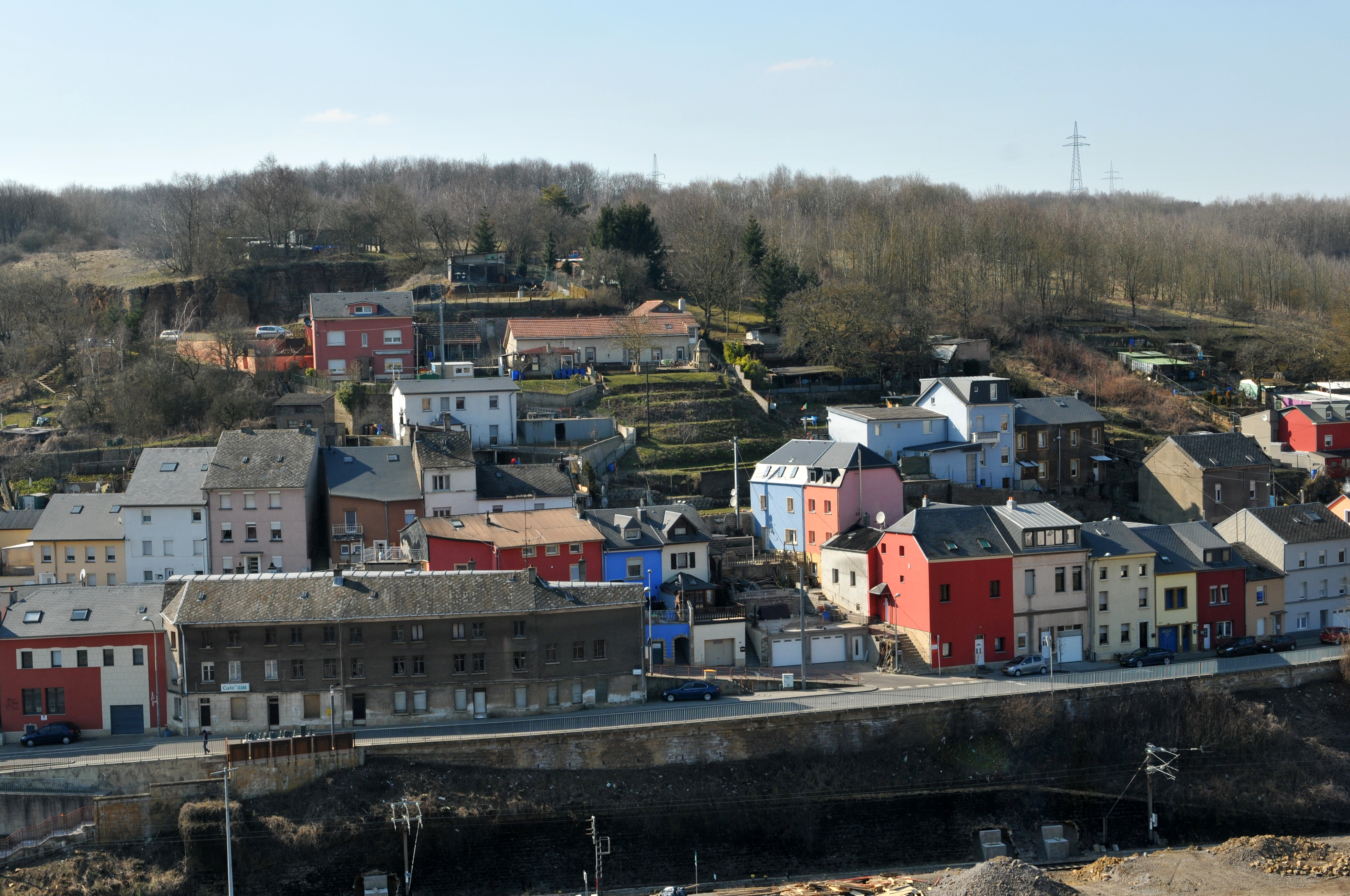 Vue op de Quartier Italien zu Diddeleng.